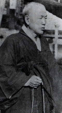 석전 박한영, 일제 강점기의 불교 승려, 사상가